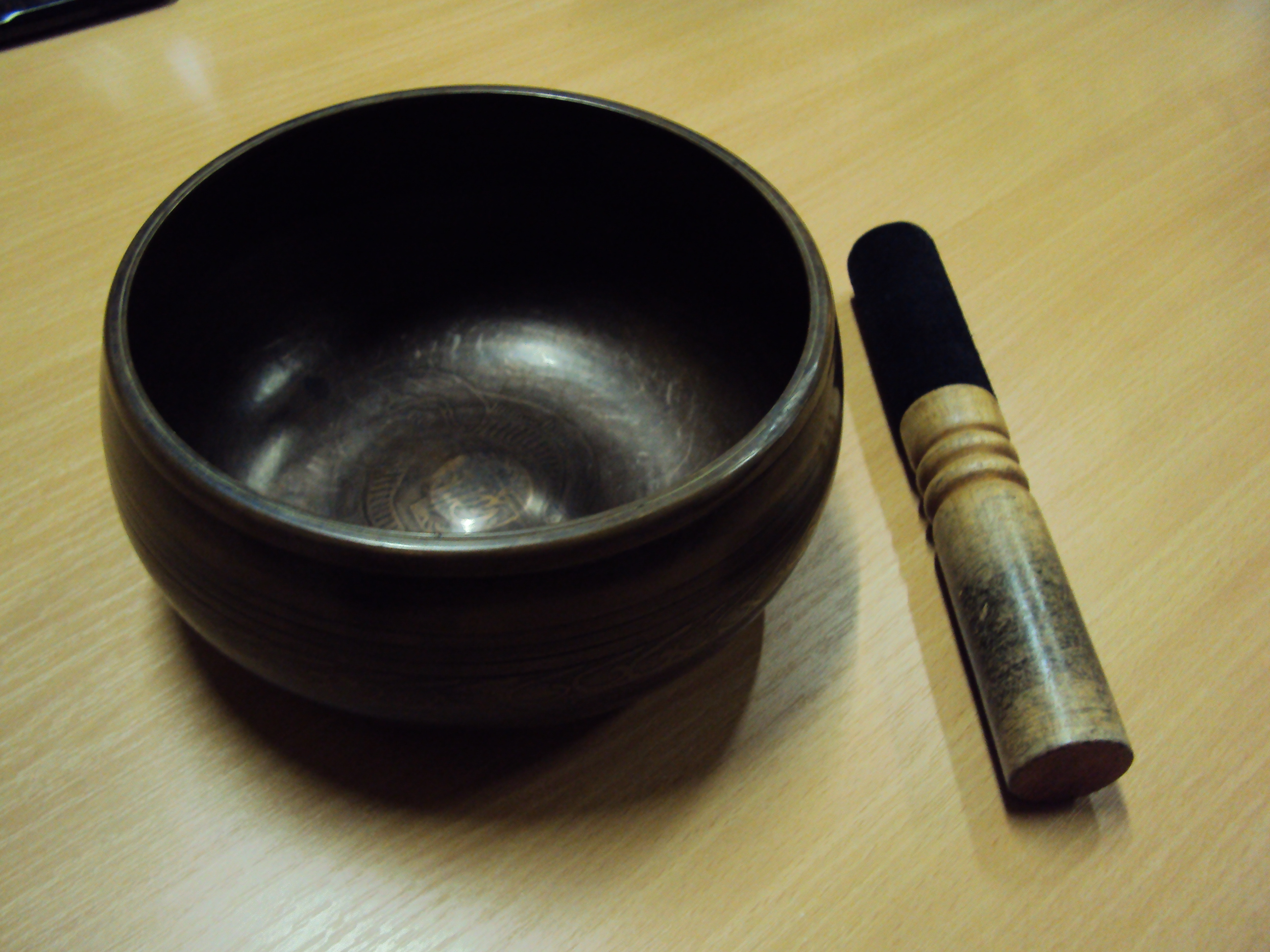 pojoča skleda z leseno palico, posneto 28.12.2010 v Hiši eksperimentov